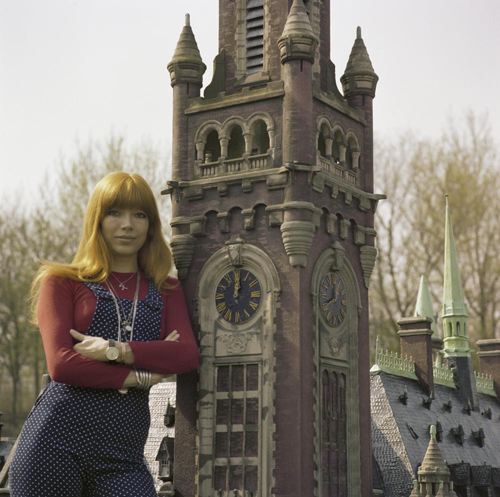 De Duitse zangeres Katja Ebstein tijdens een fotosessie voor het Eurovisie Songfestival 1980